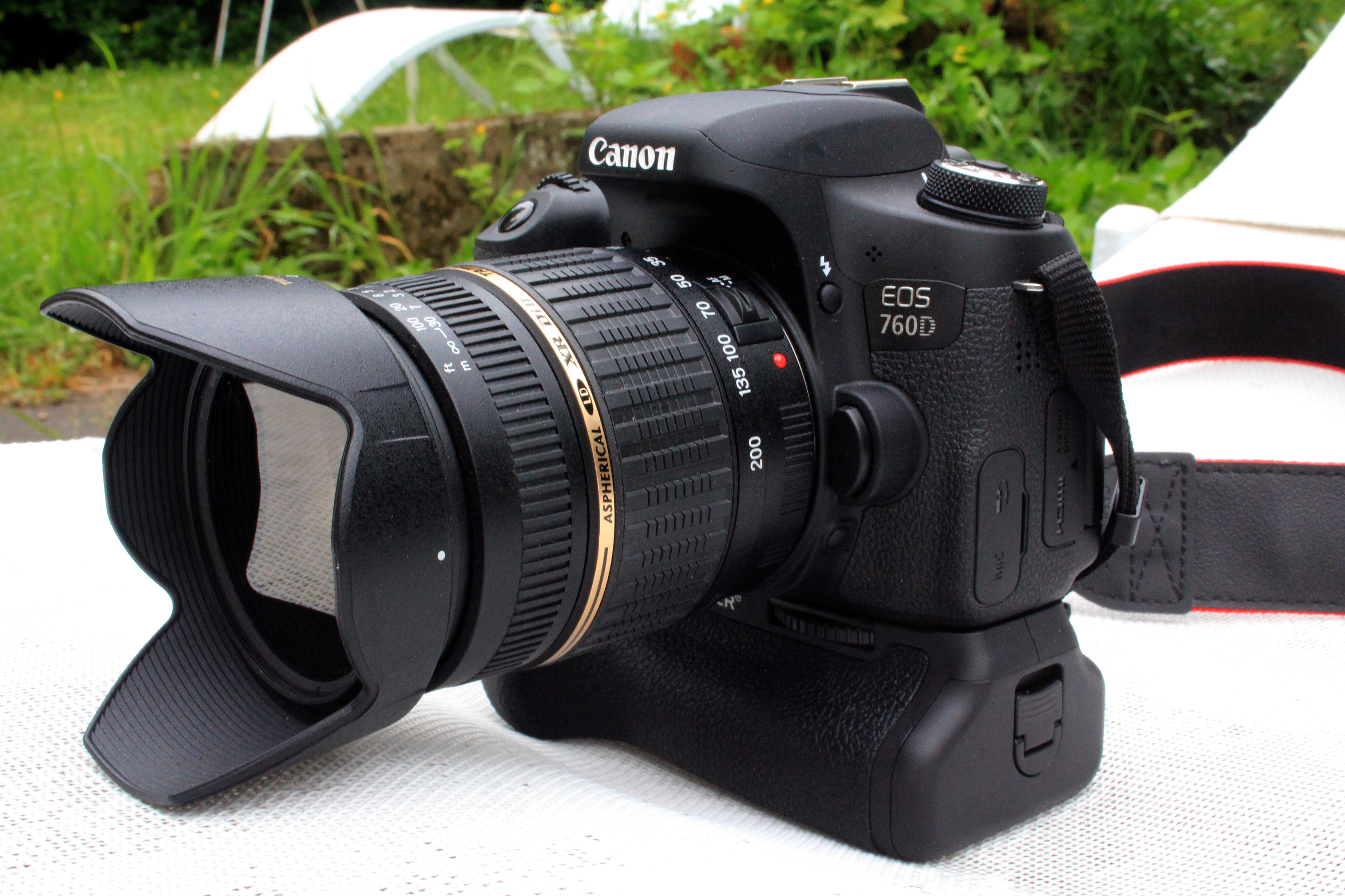 Boîtier Canon EOS 760D équipé d'un zoom Tamron AF 18-200 mm F/3.5-6.3 et grip.